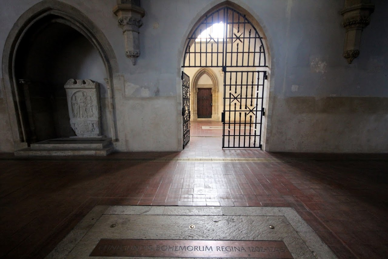 Prágai Szent Ágnes kolostor